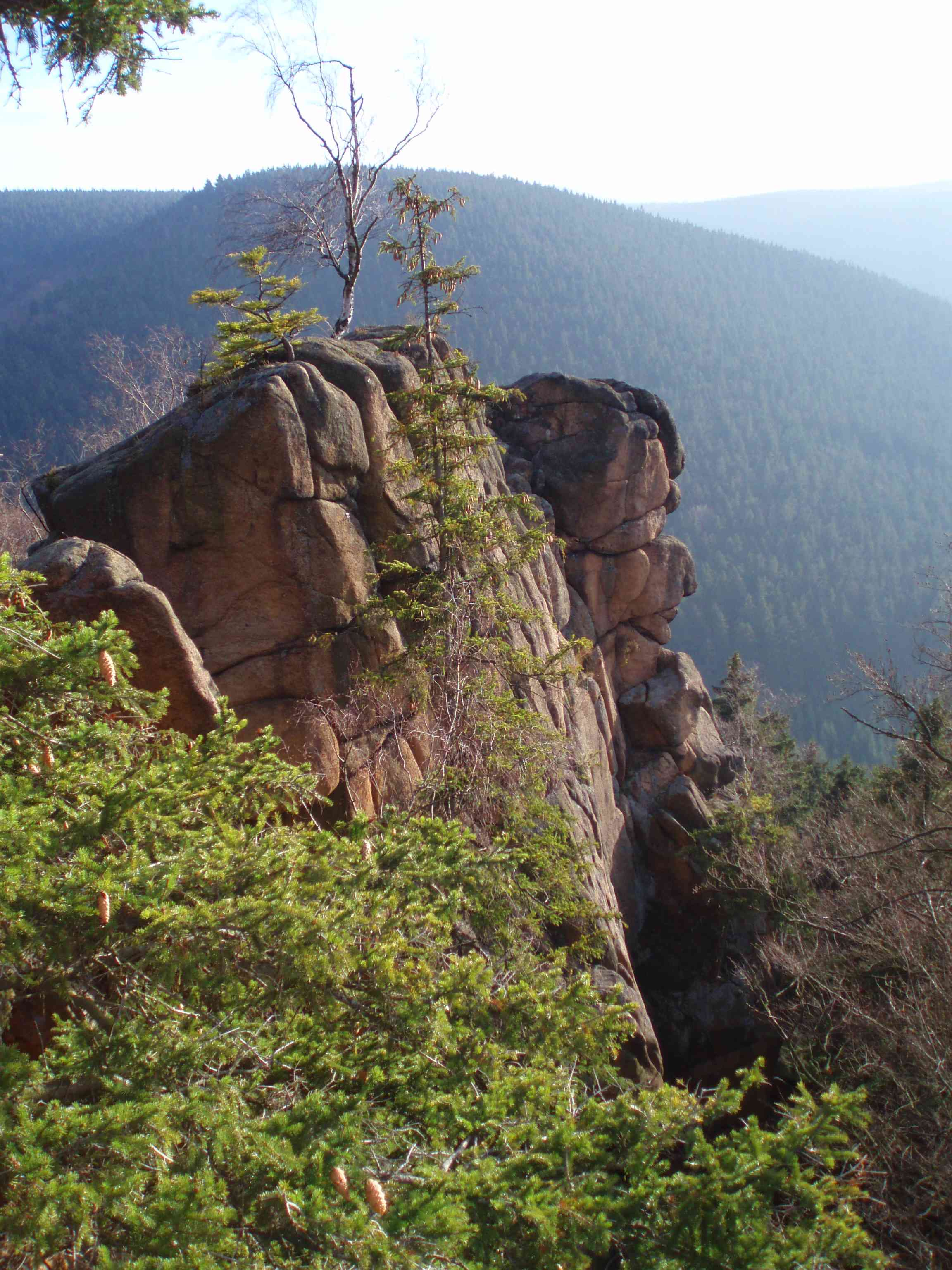 Rabenklippe